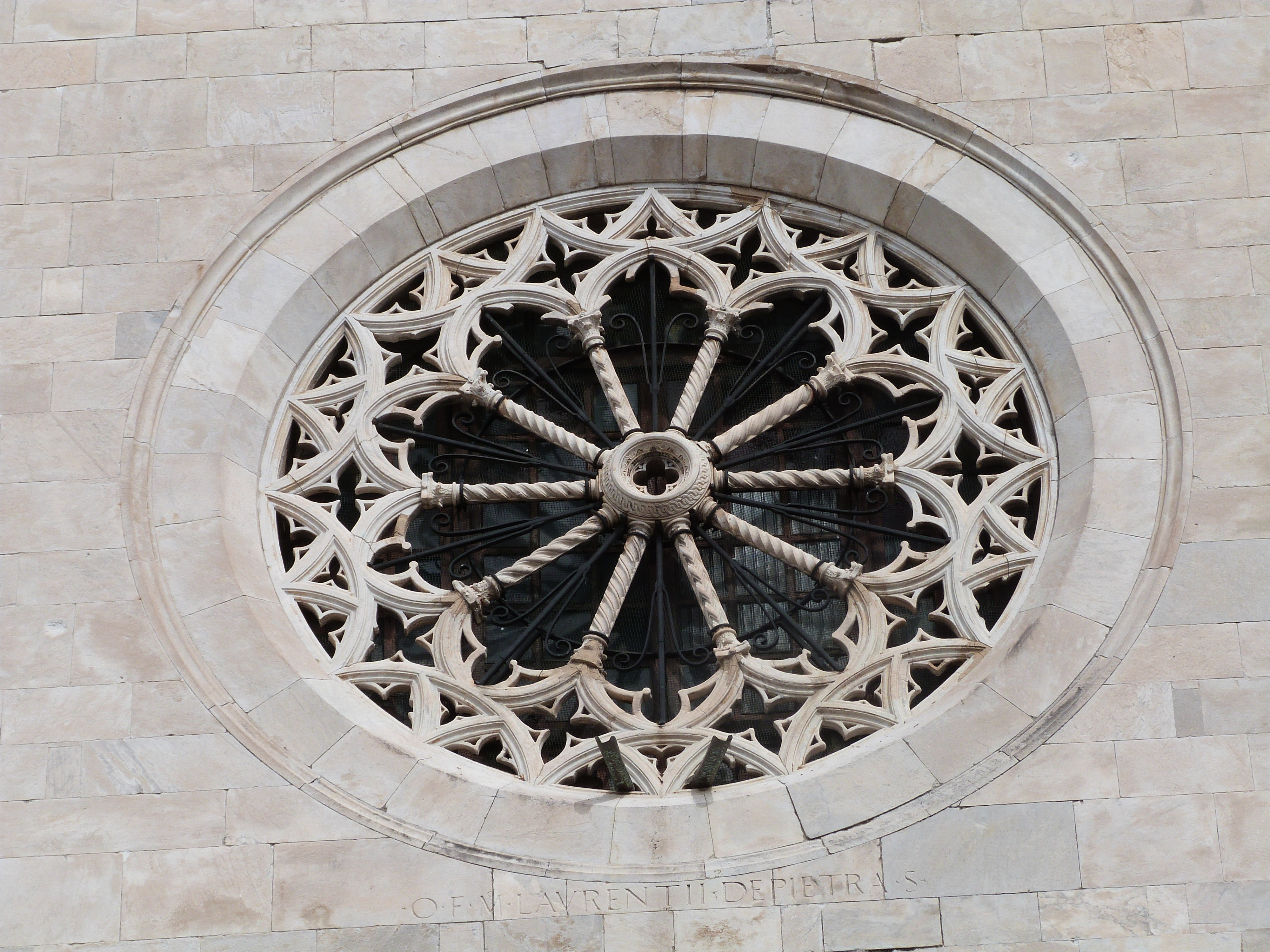 Cette rosace est placée sur la façade principale